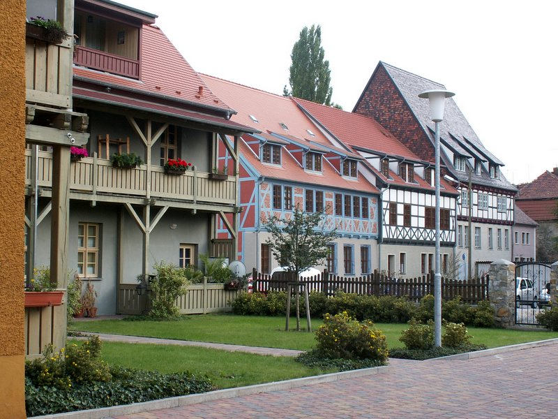 typische Häuserzeile der Altstadt von Aschersleben